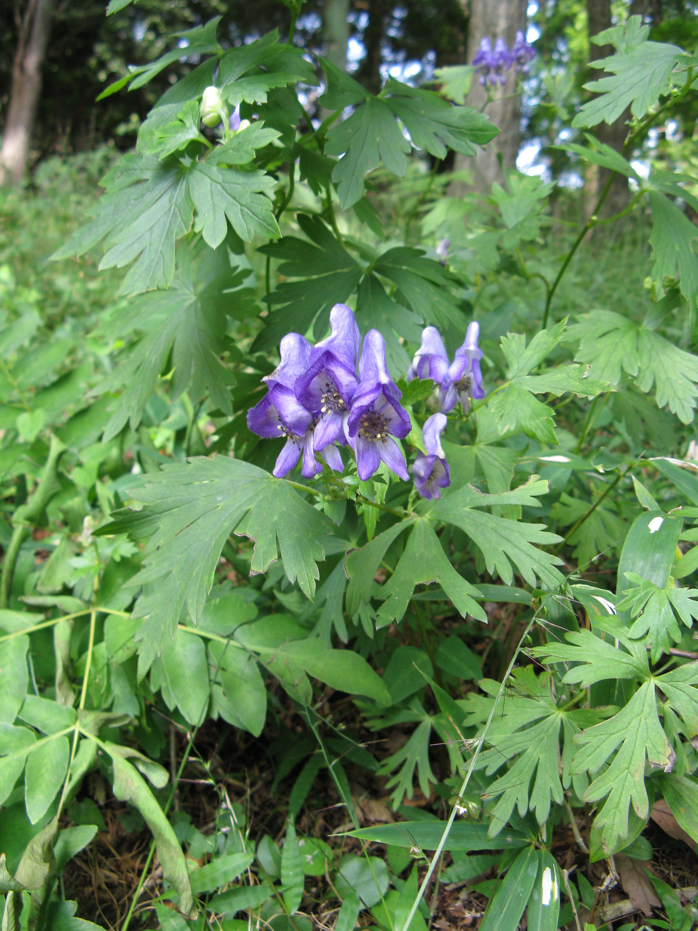 Scientific name Aconitum japonicum subsp. japonicum